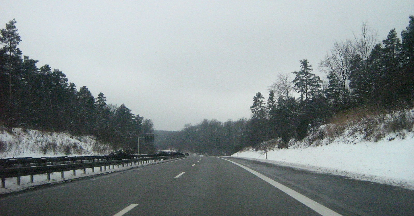 Bundesautobahn 11 (Berlin-Stettin) in Brandenburg